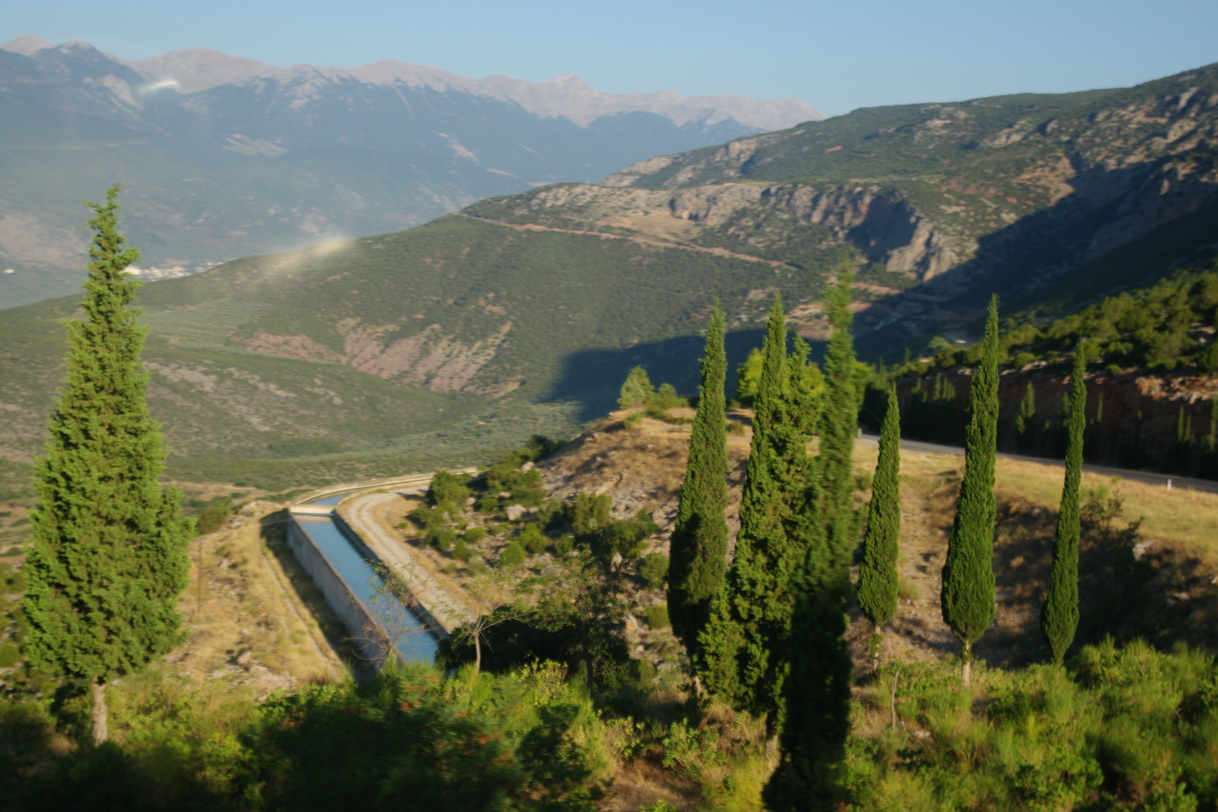 Landschaft oberhalb von Itea, Provinz Fotida